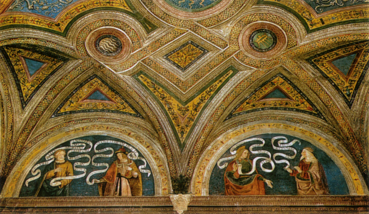 Appartamento borgia, sala del credo, soffitto